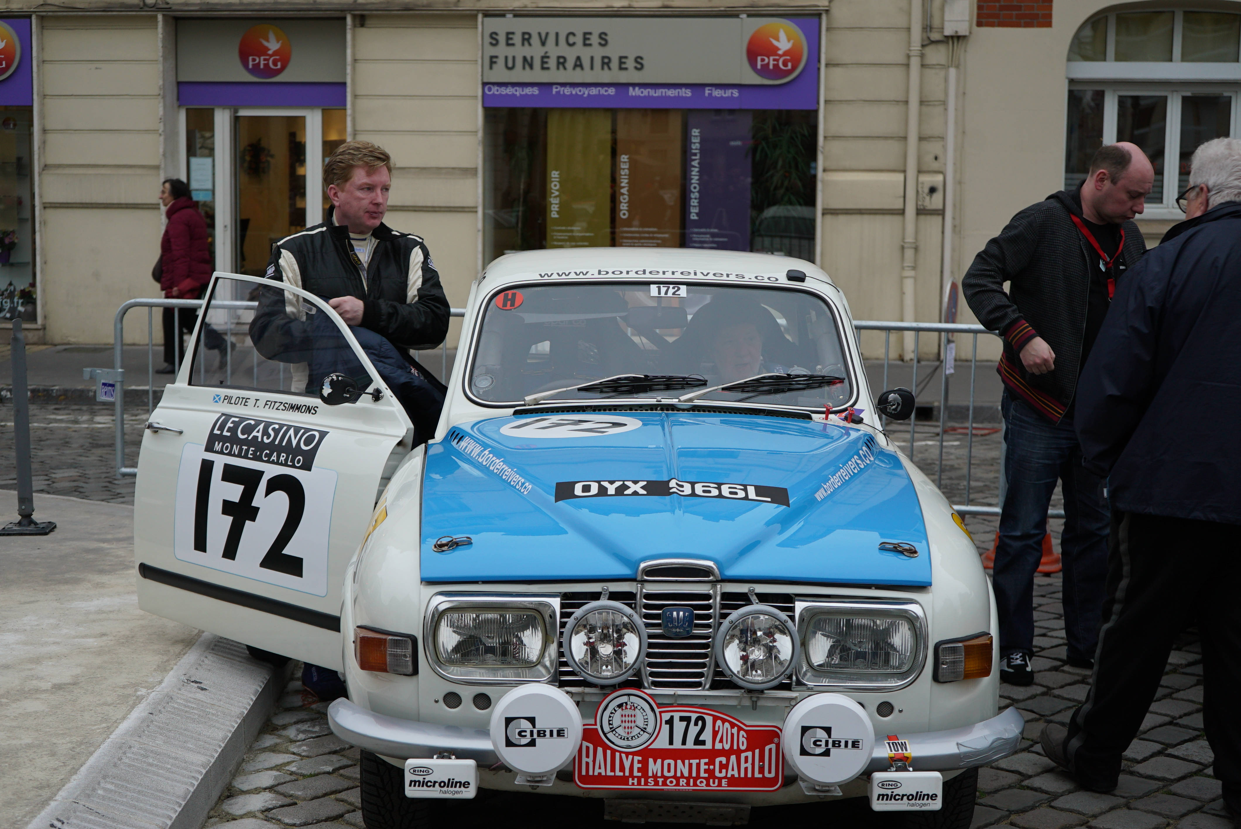 lors du départ du rallye.